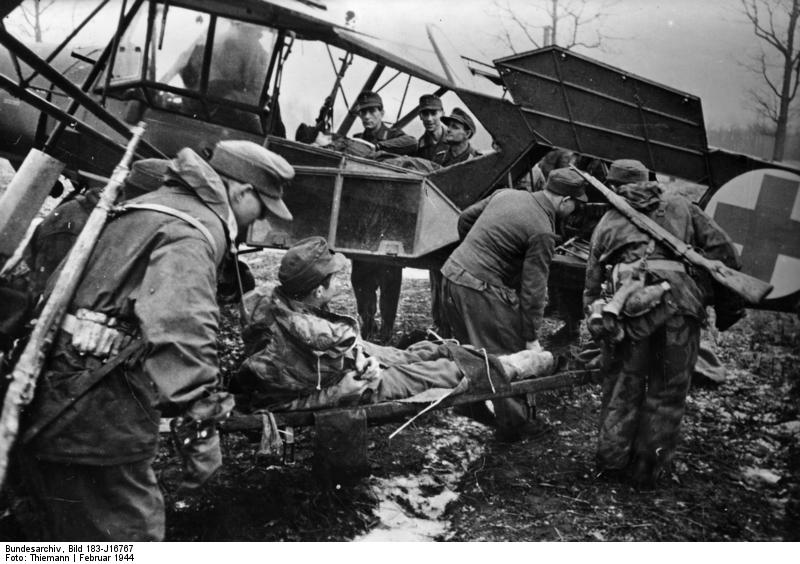 Russland, Verwundetentransport mit Fieseler Storch ADN-ZB-Archiv II.Weltkrieg 1939-45 An der Front in der Sowjetunion, Mitte Februar 1944, Verwundete deutsche Soldaten werden südlich des Pripjet aus der Hauptkampflinie durch leichte Flugzeuge von Typ "Fieseler Storch" abtransportiert. Foto: Thiemann, 615-44 [Scherl Bilderdienst] [Sowjetunion,]